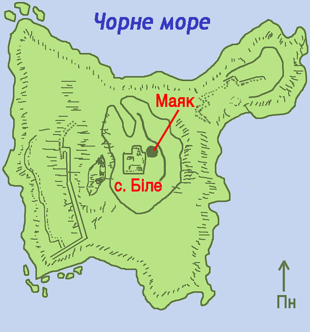 Карта острова Зміїний.